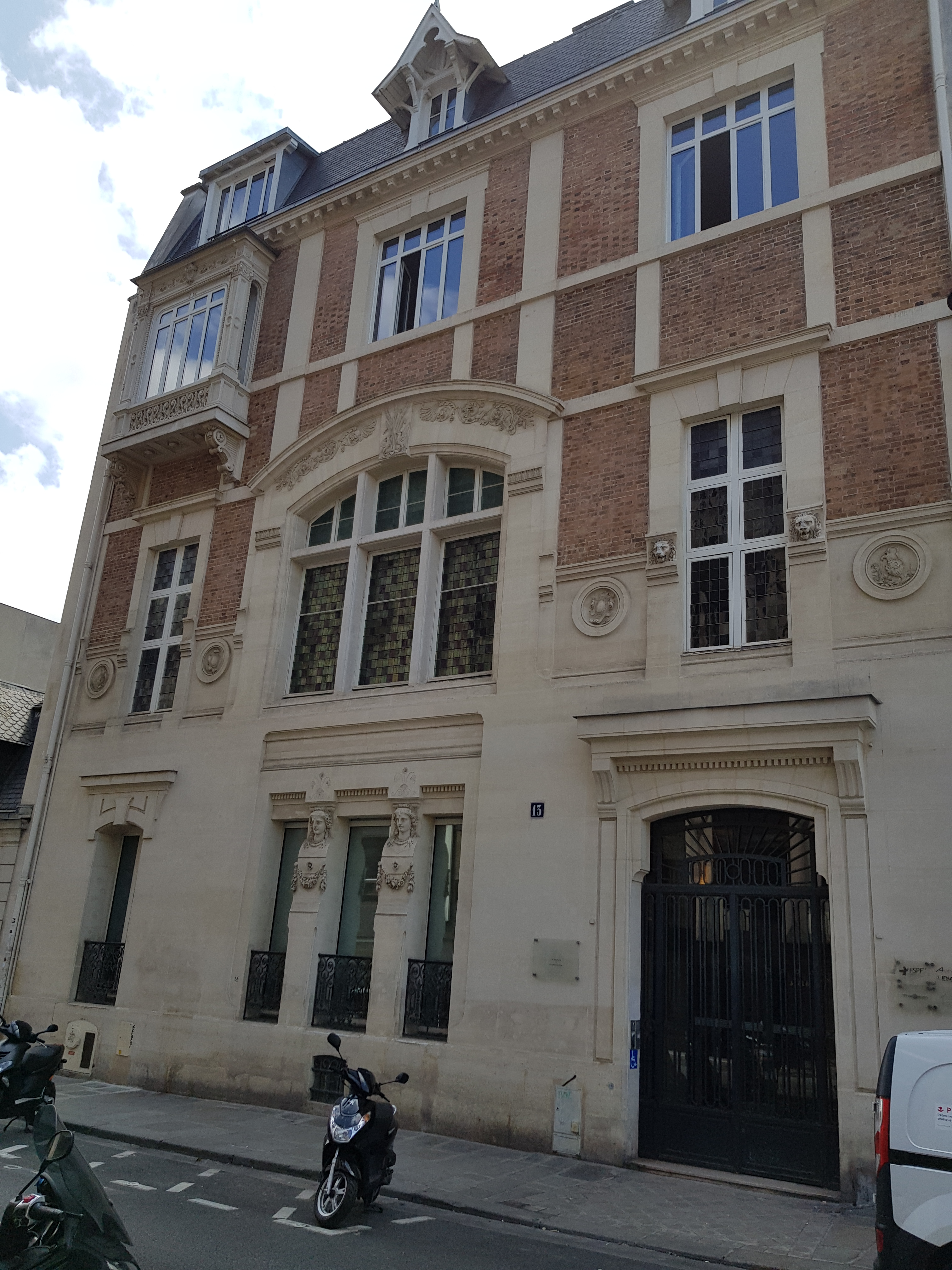 13 rue Ballu, Paris 9e.